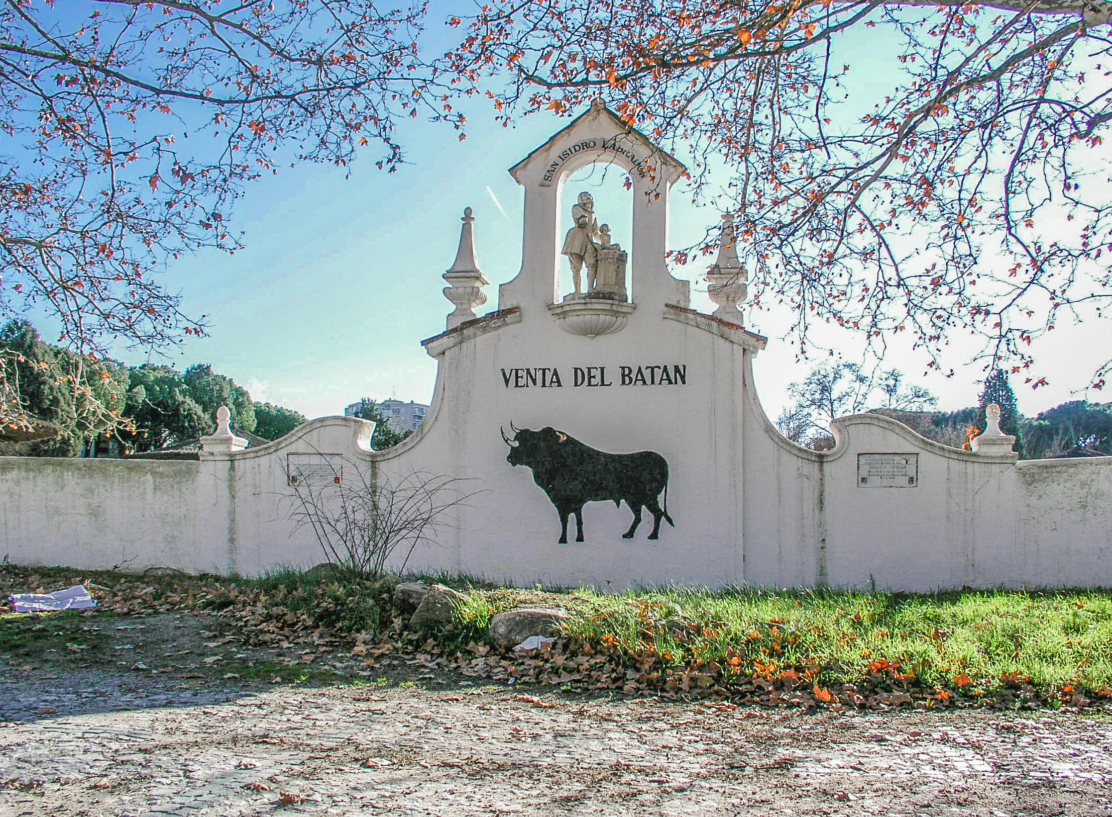 Casa de Campo, Madrid, Spain. Venta del Batan.